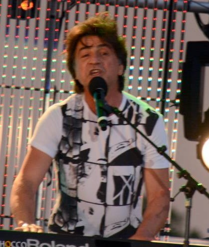 Thierry Pastor au concert "La Folie des années 80" à Enghien-les-Bains